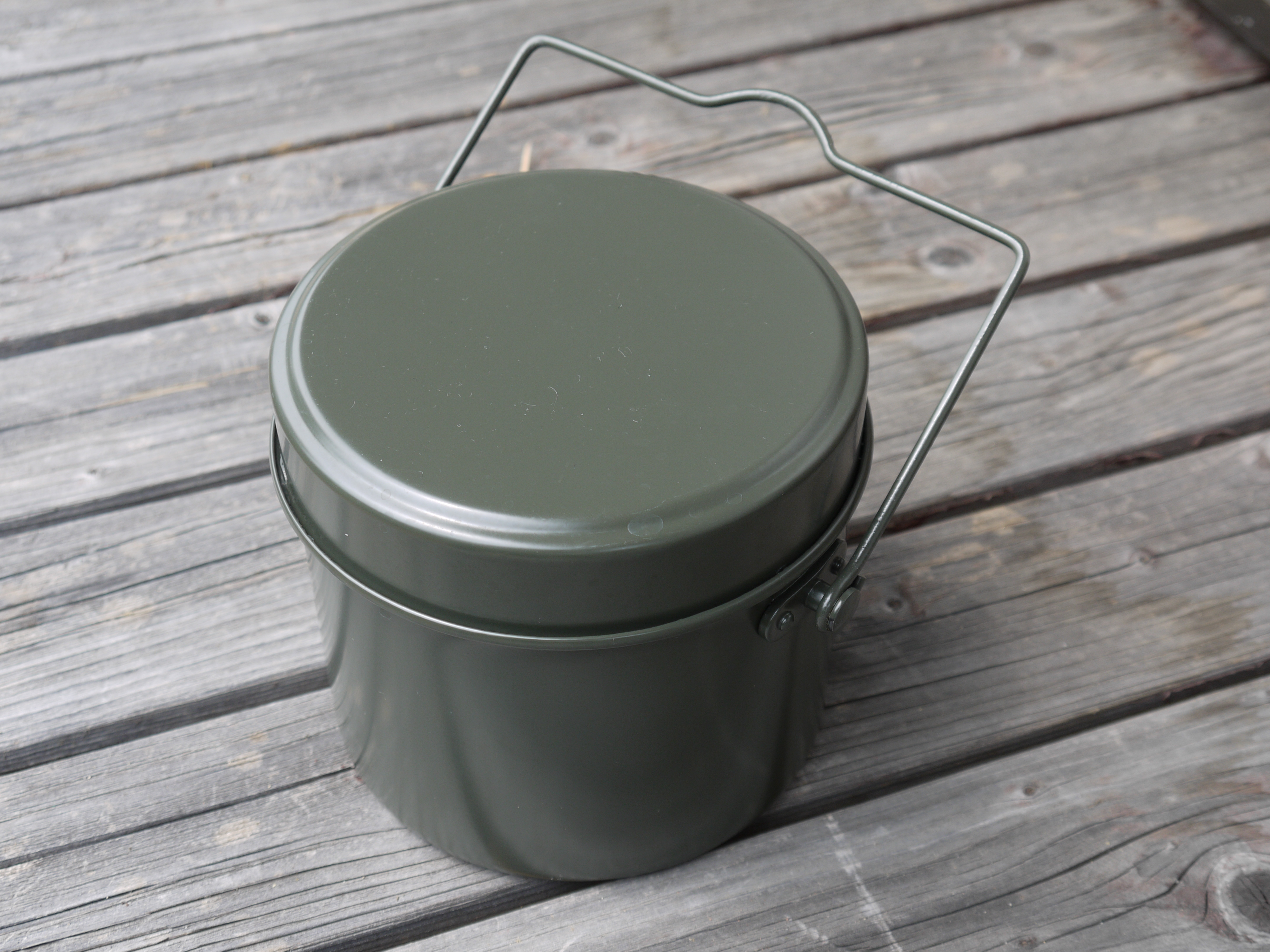 Japanese military mess kit